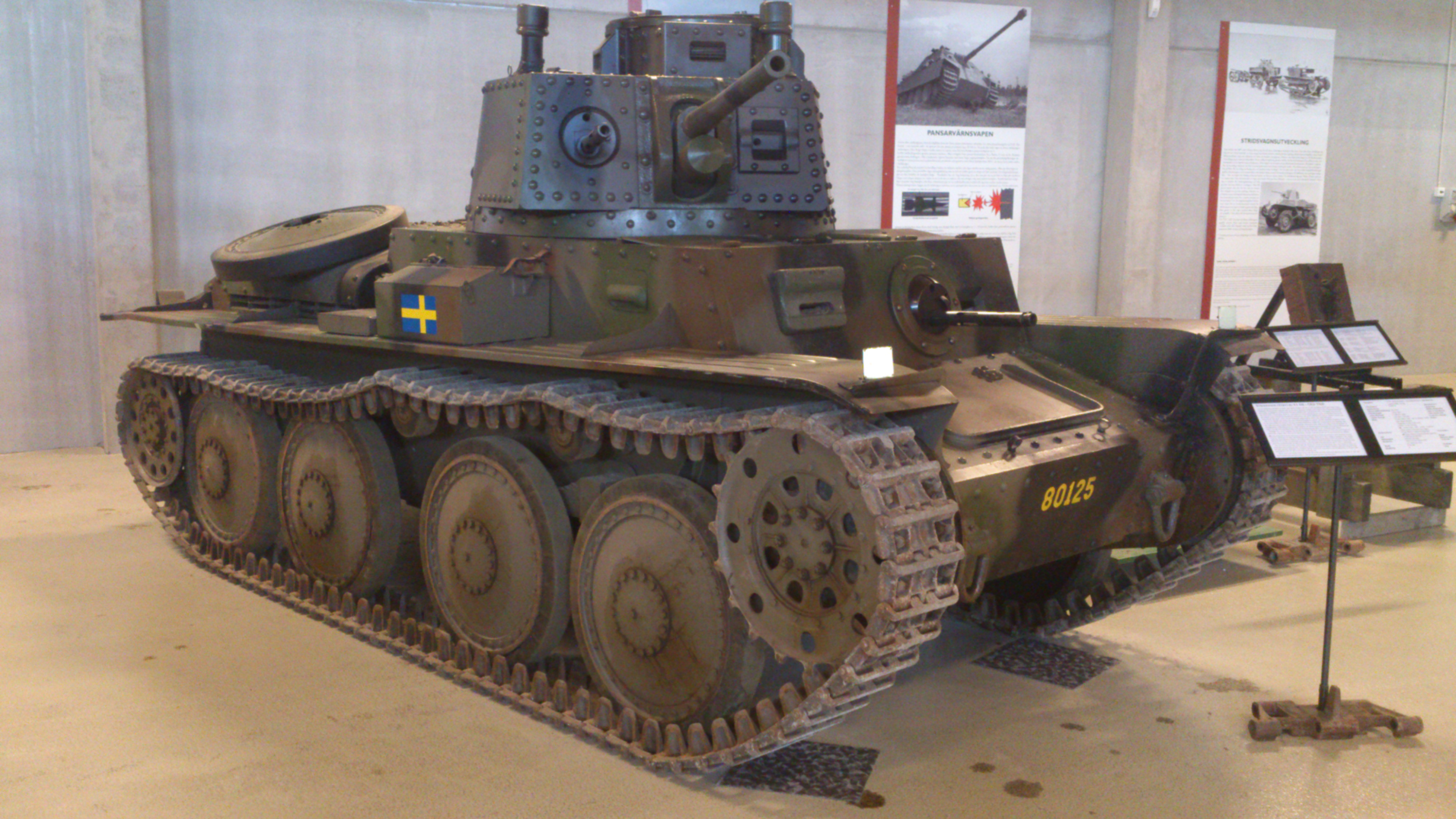 Stridsvagn M 41 på Försvarsfordonsmuseet Arsenalen i Strängnäs